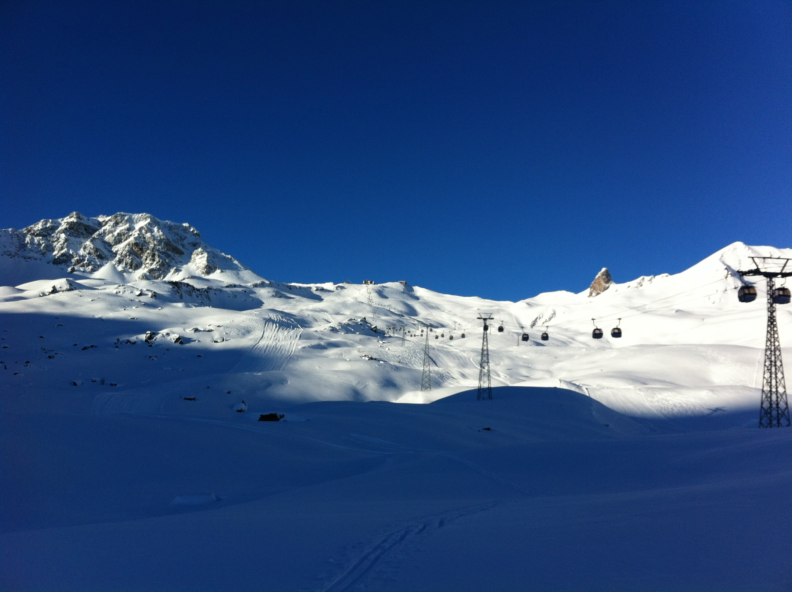 Hörnli Express mit Skigebiet Hörnli und Tschirpen (Arosa)